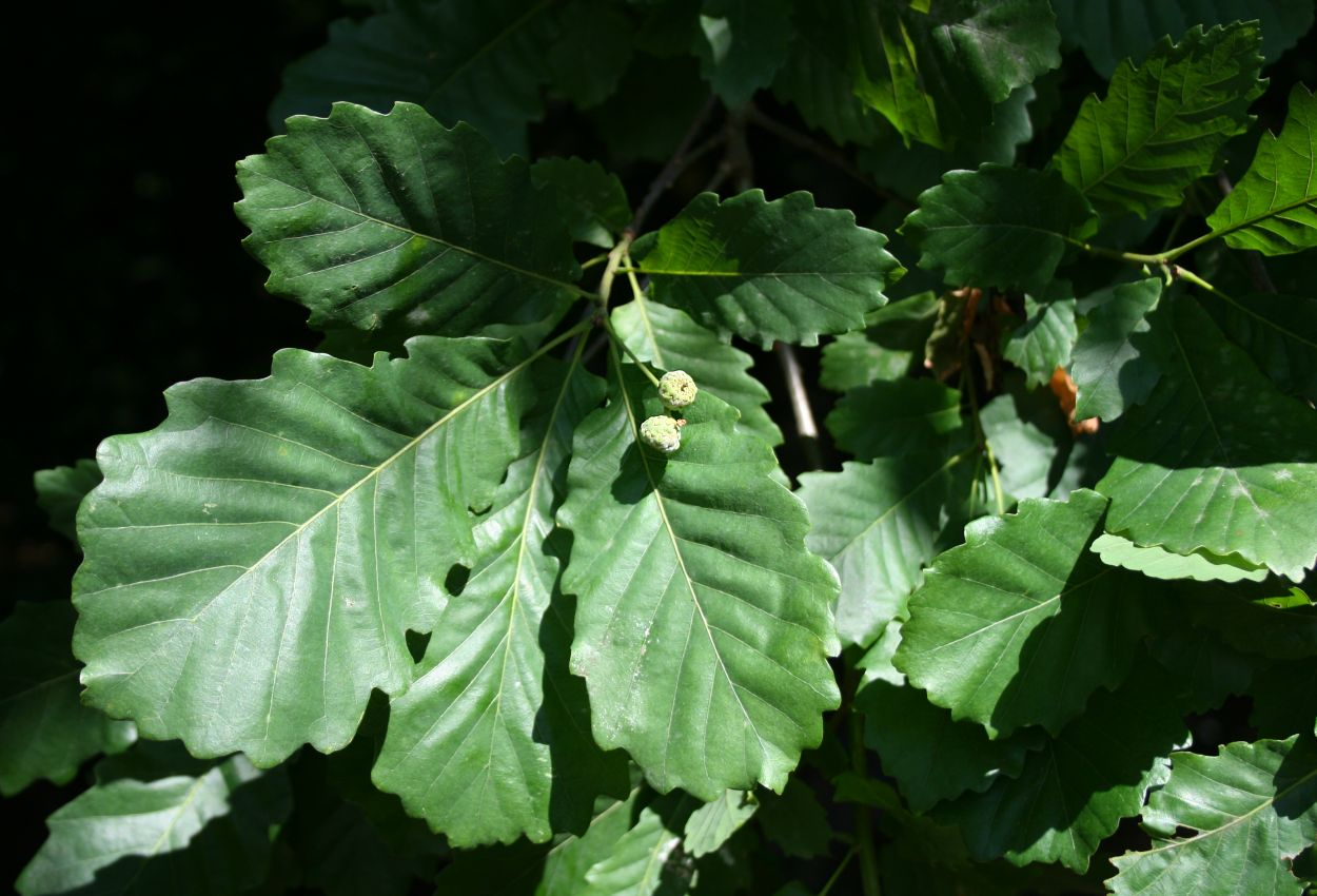 Quercus hartwissiana, Buchengewächse (Fagaceae) - Türkei/Türkiye/Turkey: Sakarya Prov./Sakarya ili, Sinanoğlu SW Karasu